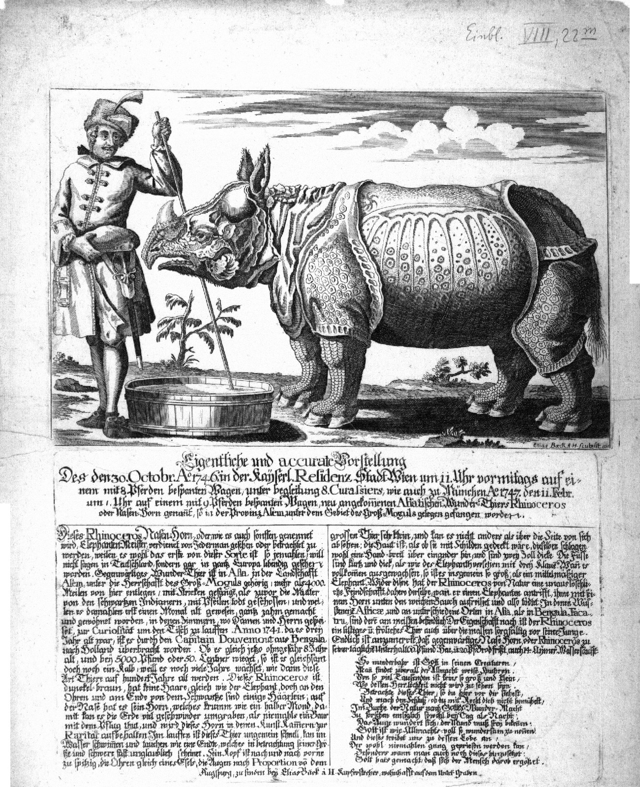 Flugschrift mit Darstellung eines Nashorns